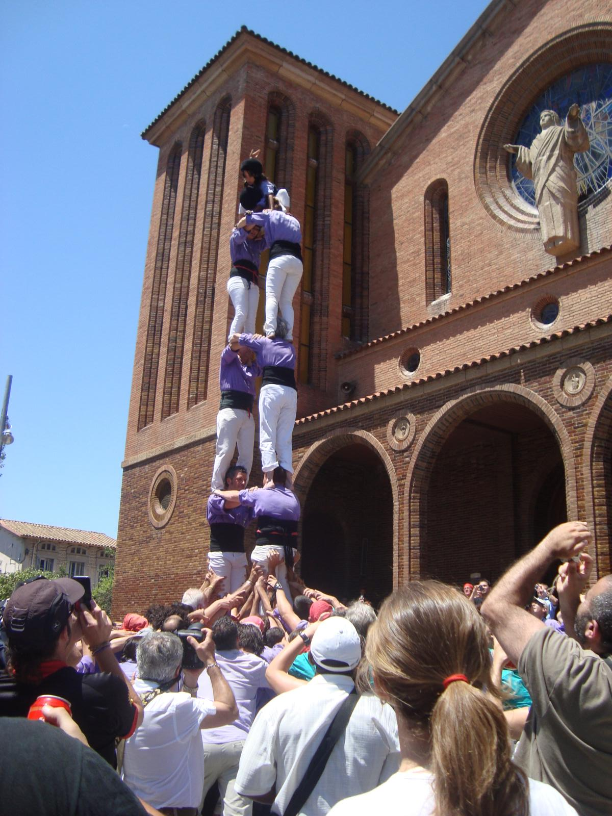 2 de 6 dels Castellers de Cornellà. Diada de Festa Major. Diumenge, 26 de Juny 2011 . C/ Plaça de l'Església, Cornellà del Llobregat. Al darrera, l'Església de Santa Maria